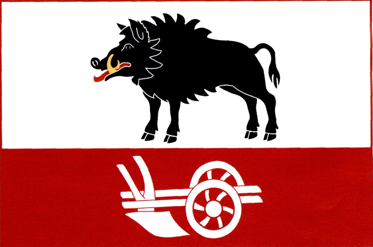 Vlajka obce Vepříkov